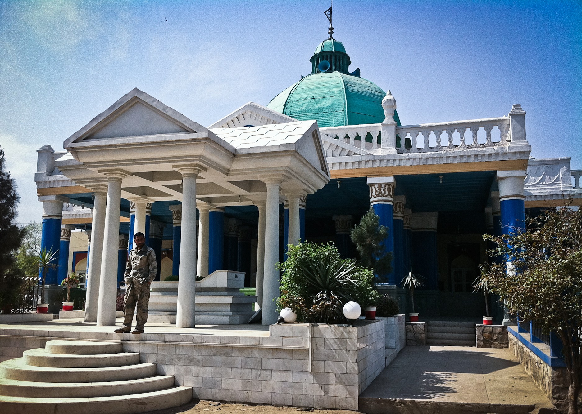 Mausoleum of King Amanullah Khan in Jalalabad, Afghanistan.